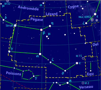 Carte pour la constellation Pégase Produite à l'aide du logiciel PP3